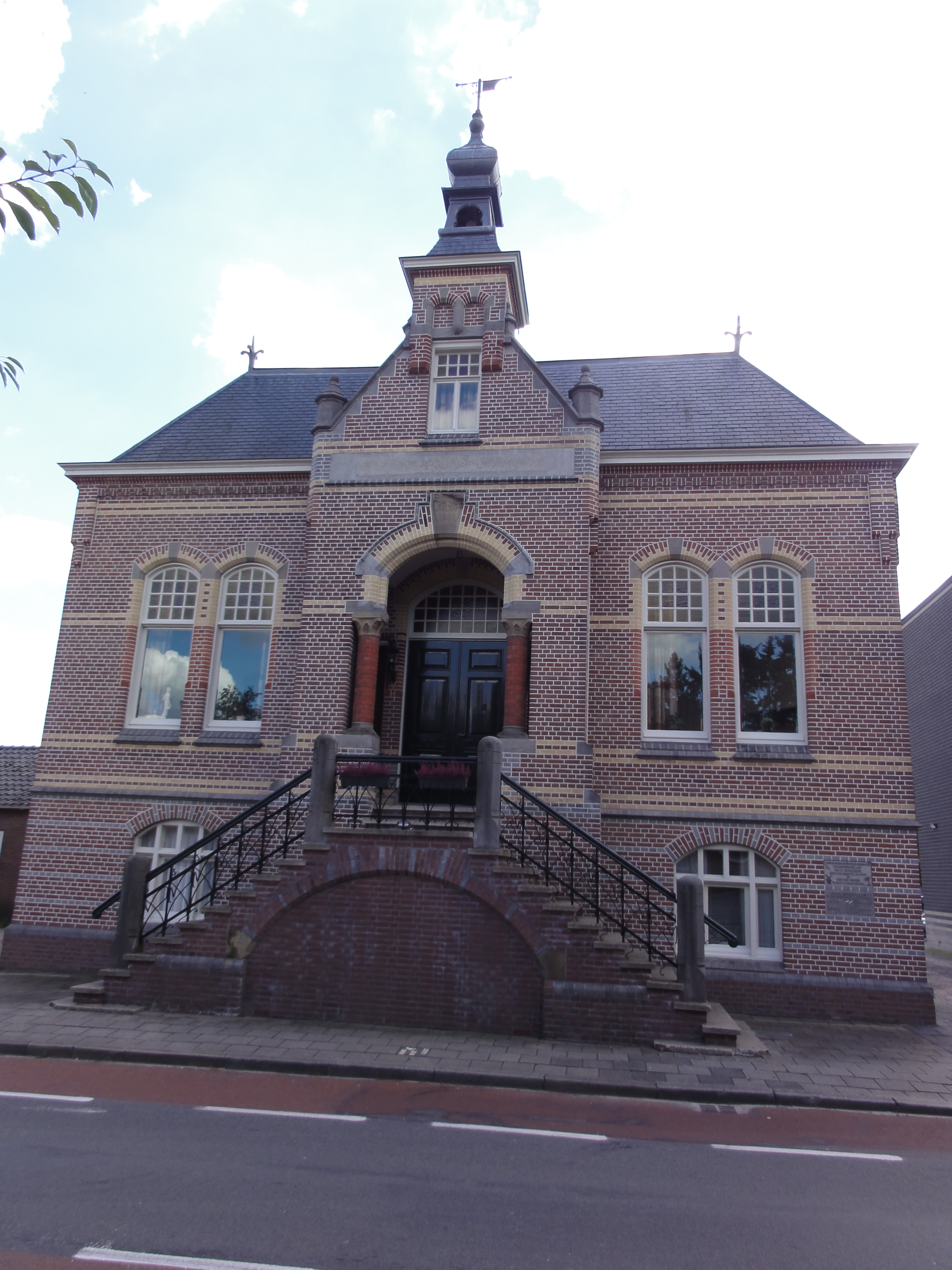 Beneden-Leeuwen Rijksmonument 523084 Voorm. gemeentehuis Zandstraat 55